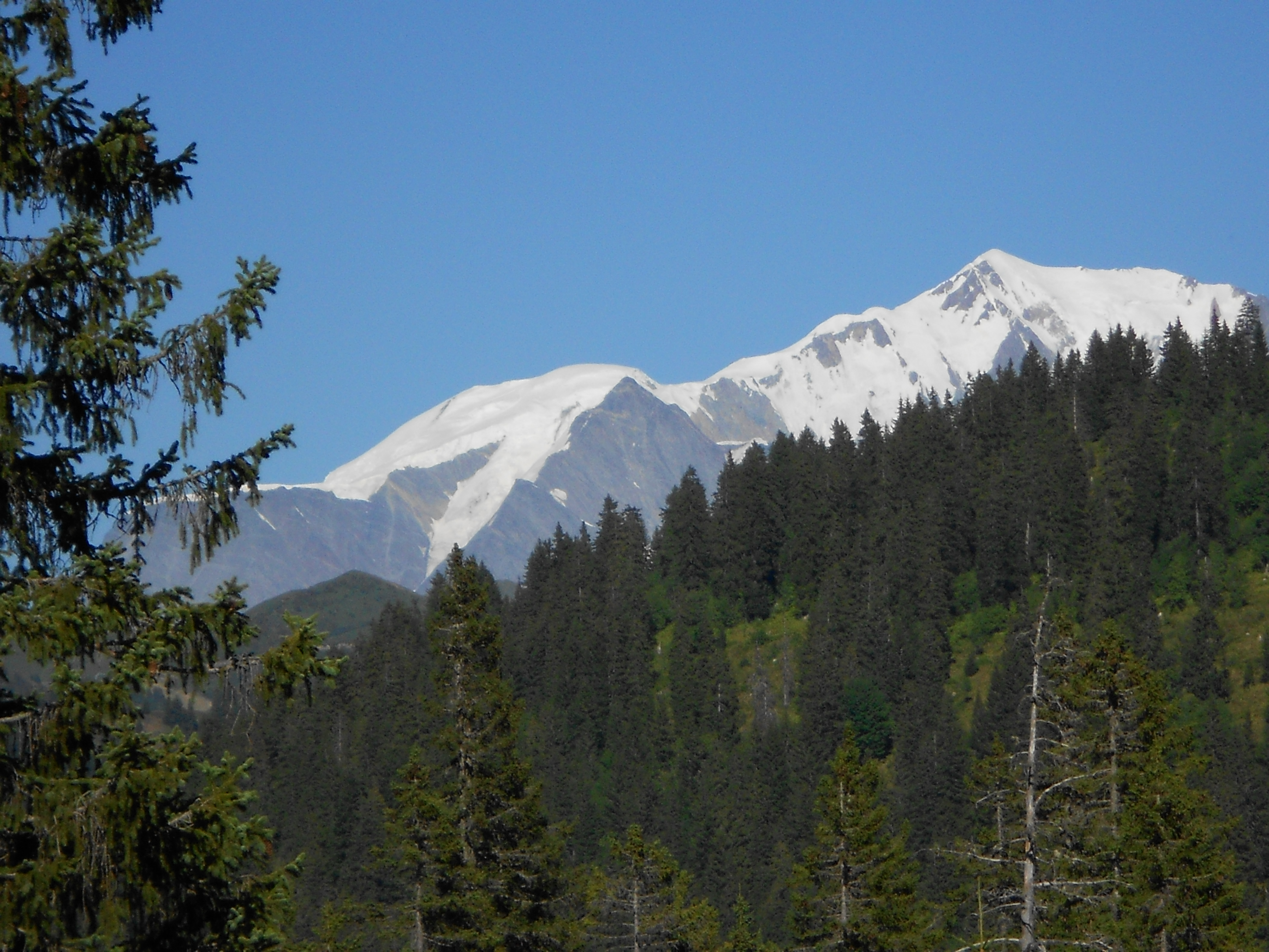 le massif du mont blanc vu des tourbieres